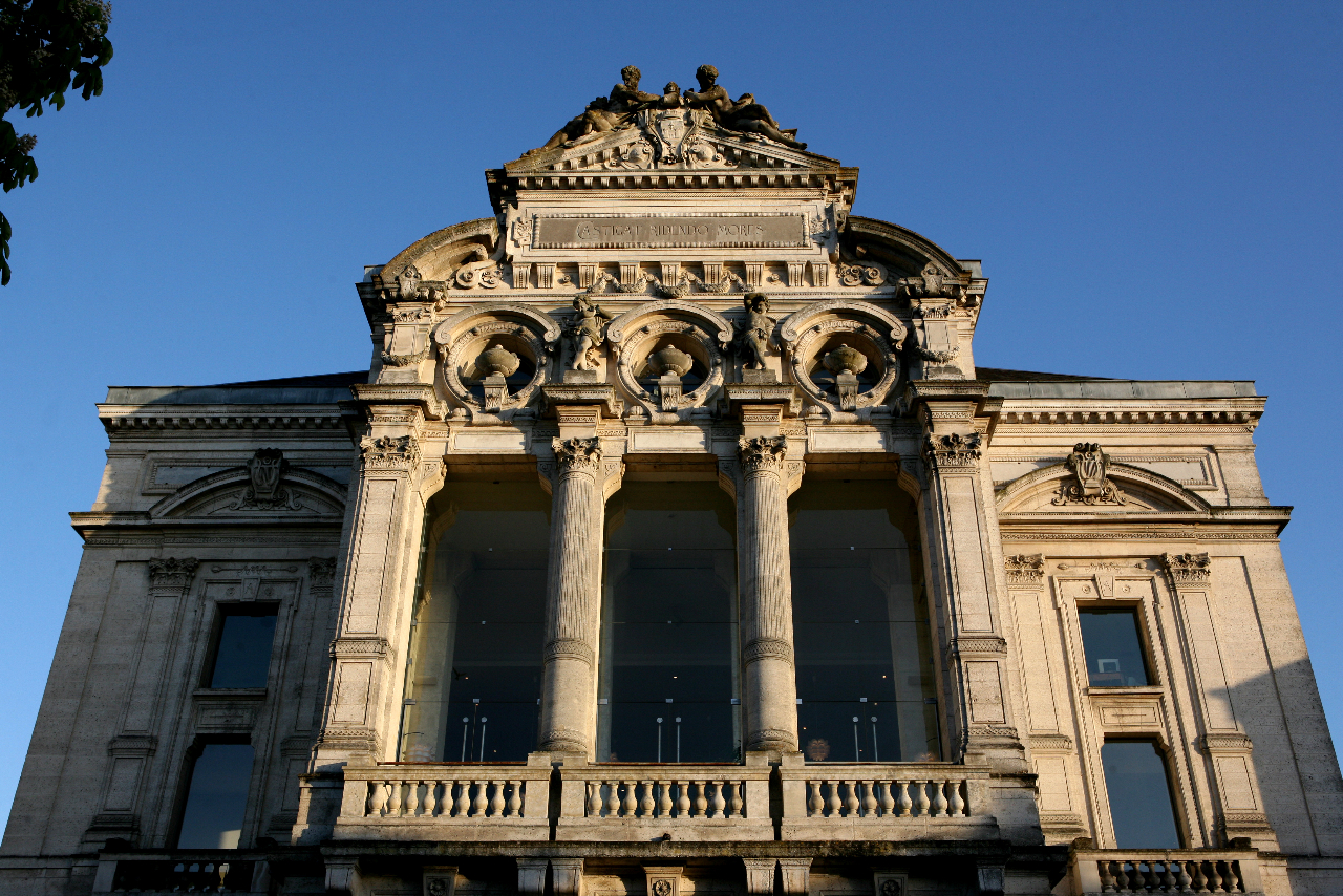 "Castigat ridendo mores"